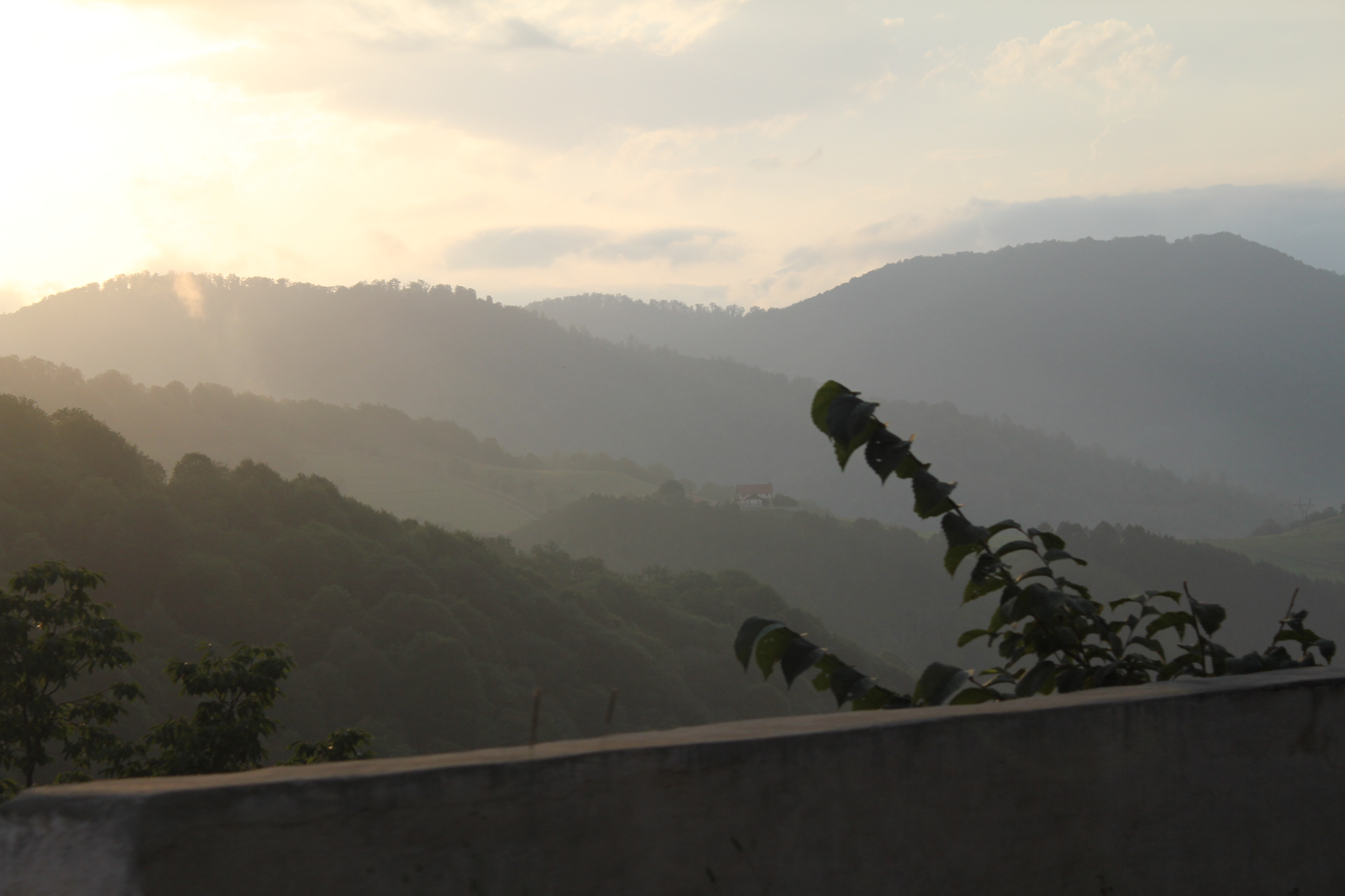 Иджеван, Тавушская область